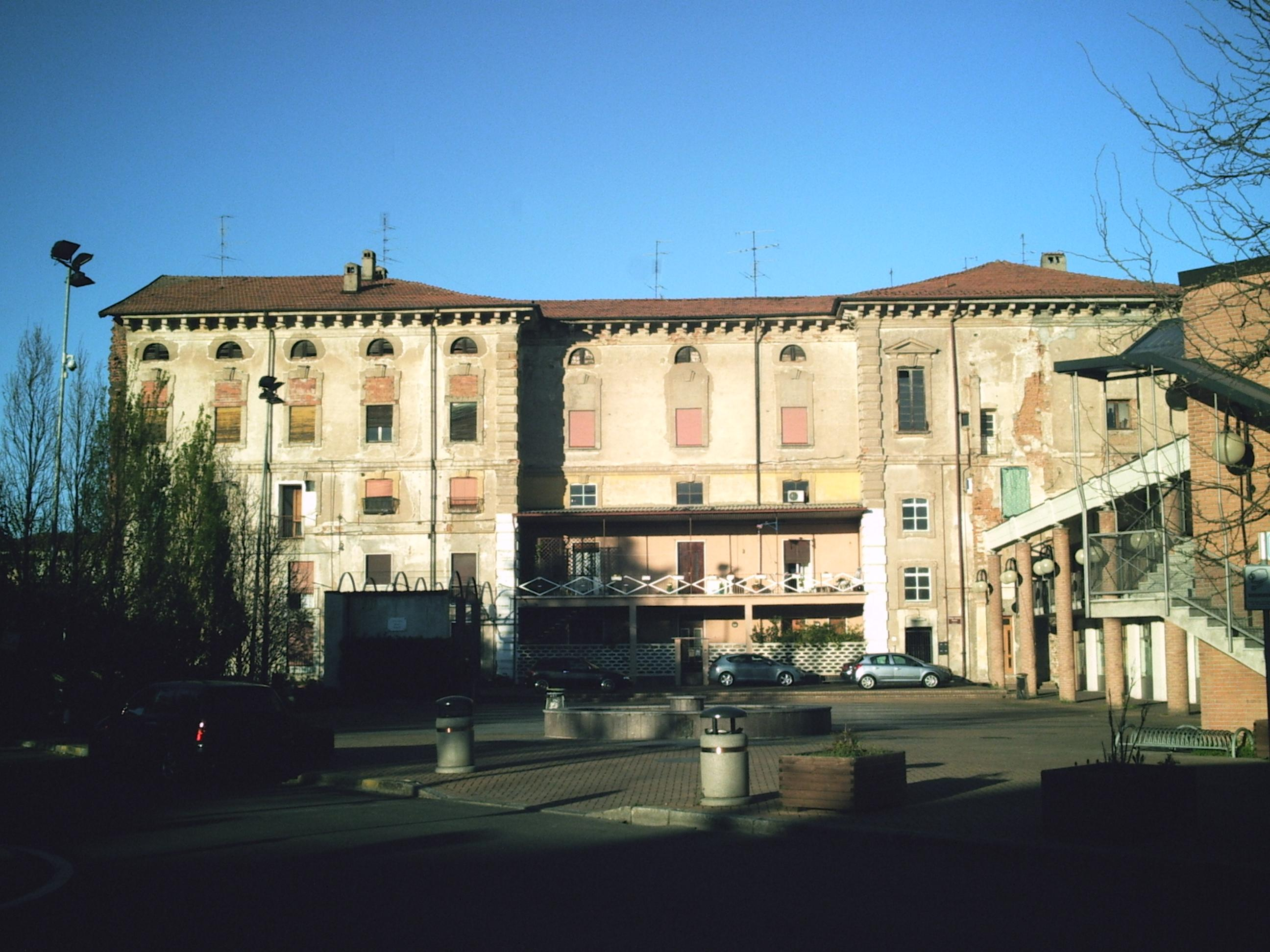 Palazzo Visconti-Castelli da Piazza della Pace a Canegrate (MI)